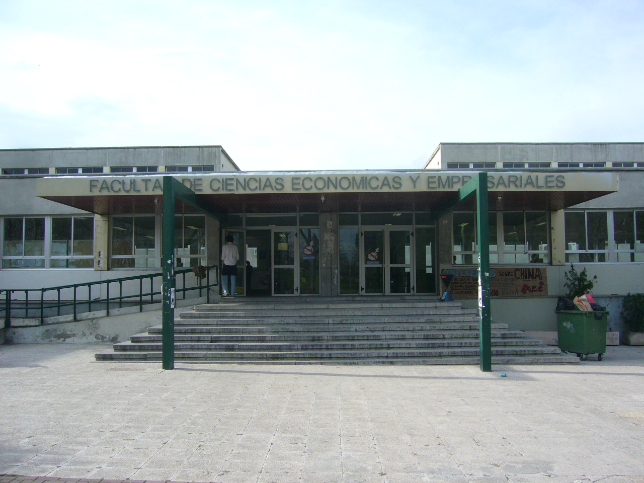 Edificio de la Facultad de Ciencias Económicas y Empresariales de la Universidad Autónoma de Madrid en Cantoblanco Economics and Business building in Universidad Autónoma de Madrid (Autonomous University of Madrid) in Cantoblanco